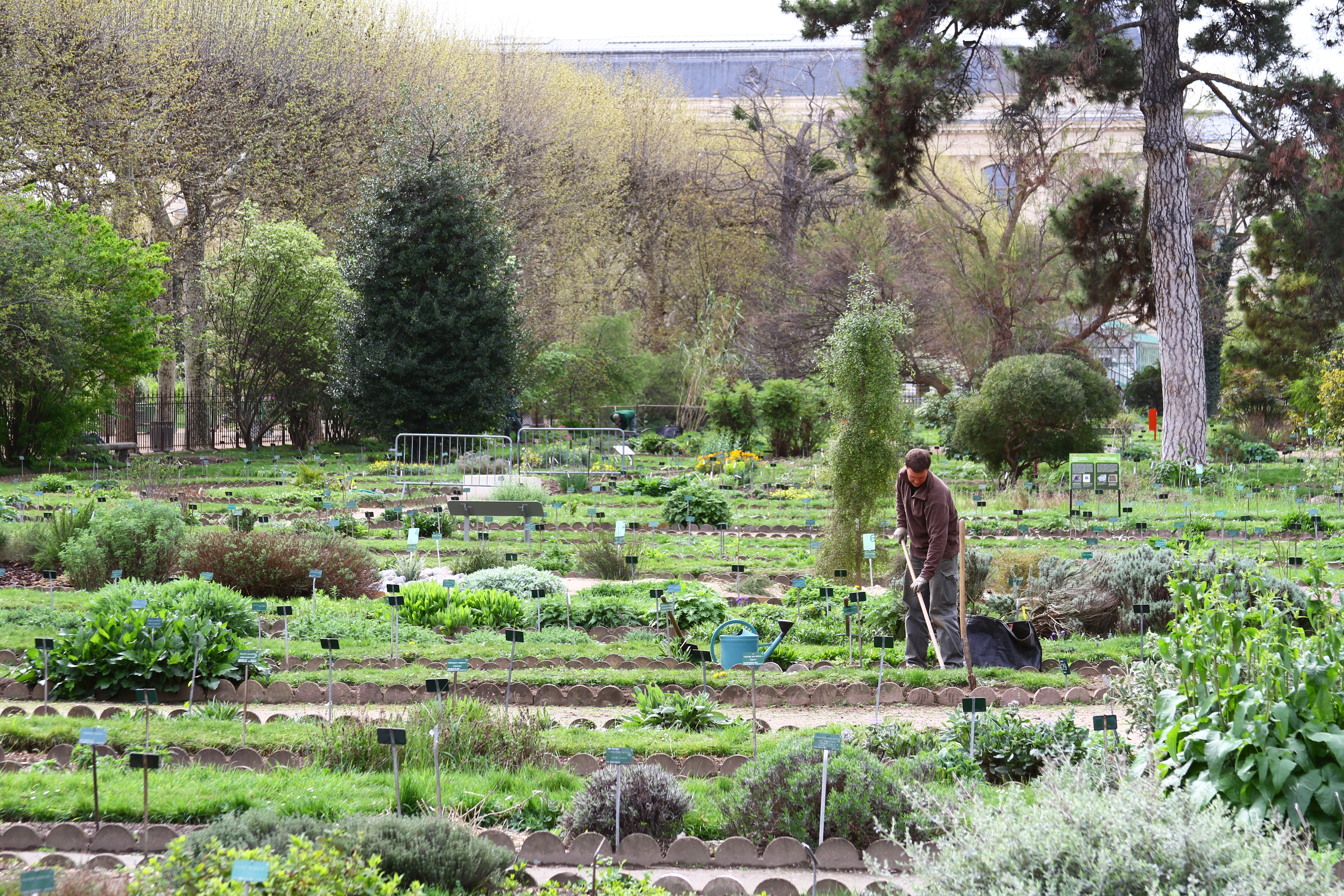 Jardin des Plantes de Paris